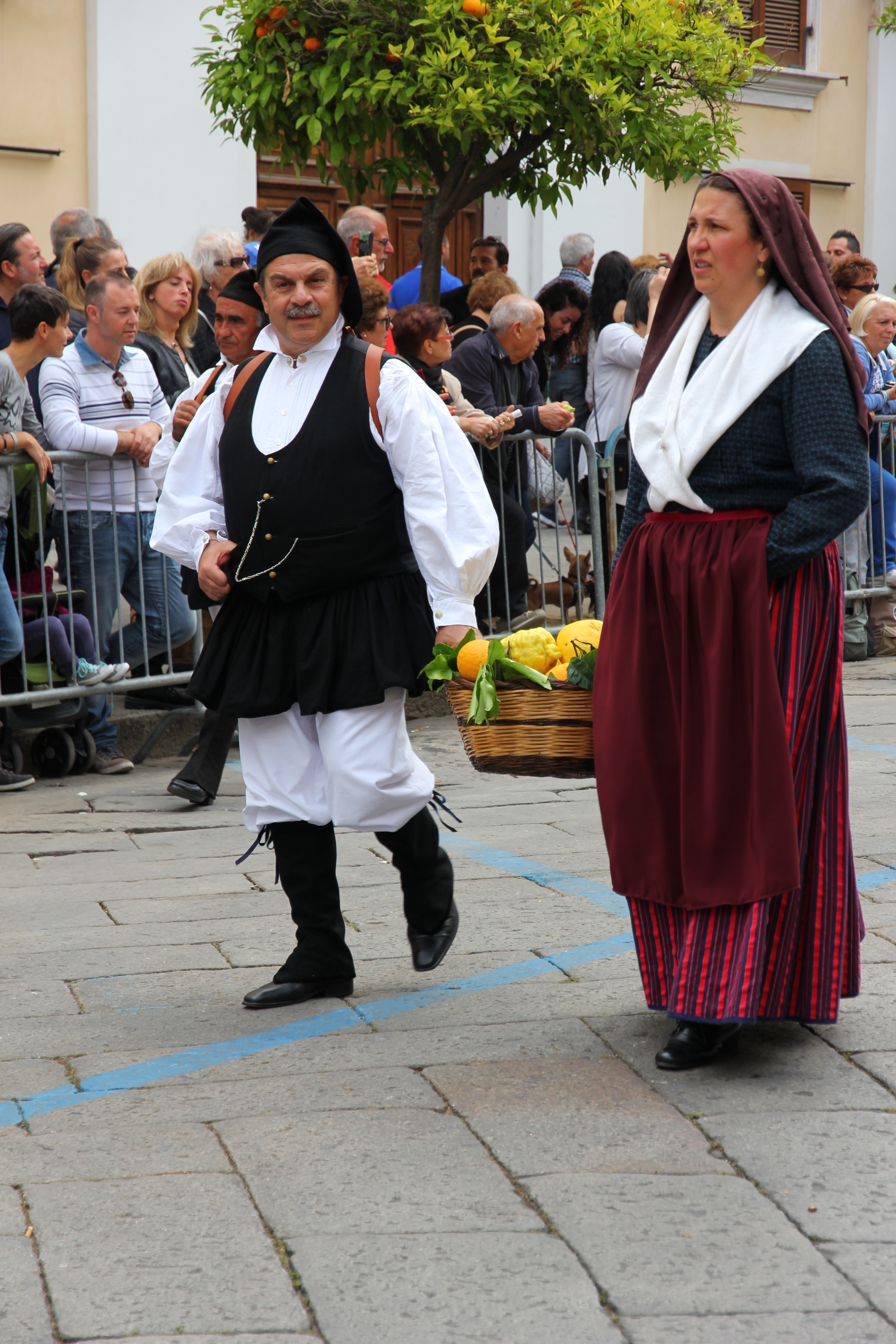 Costume tradizionale